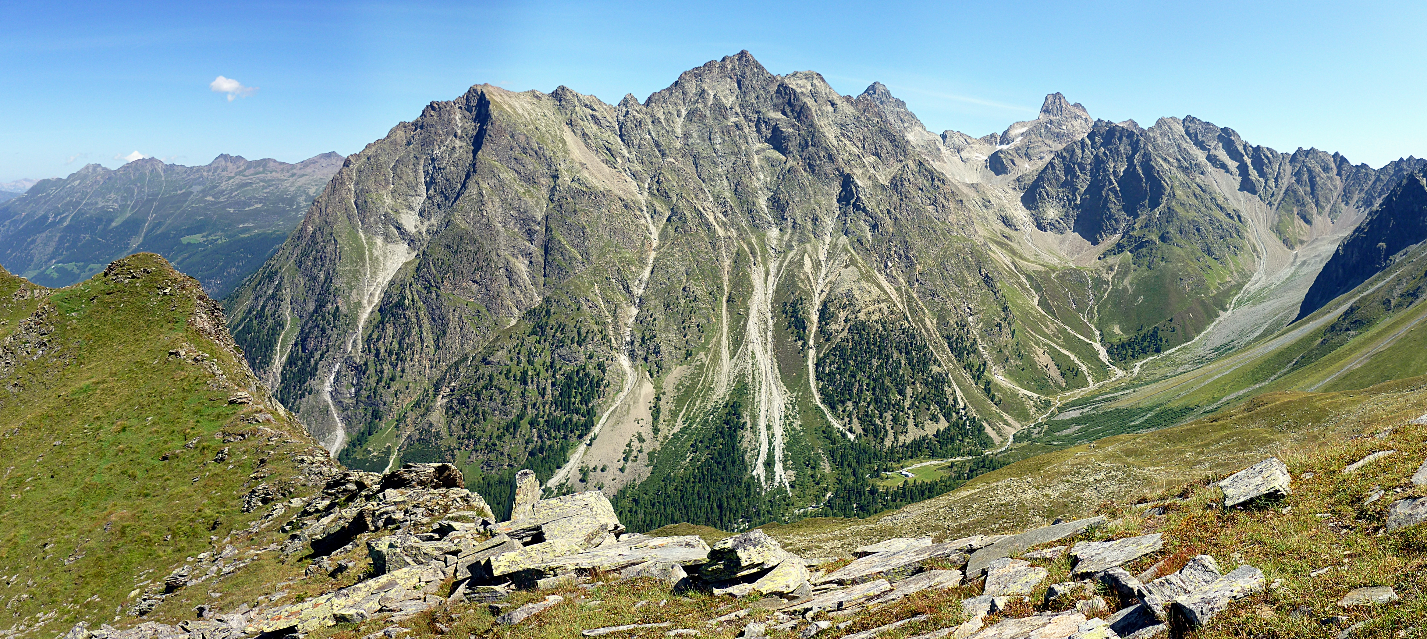 Panorama des Verpeiltals. Ein Seitental des Kaunertals. Zentrale Gipfel: Schweikert, Hochrinneck, Gsallkopf, Rofele Wand und Sonnenkögel.